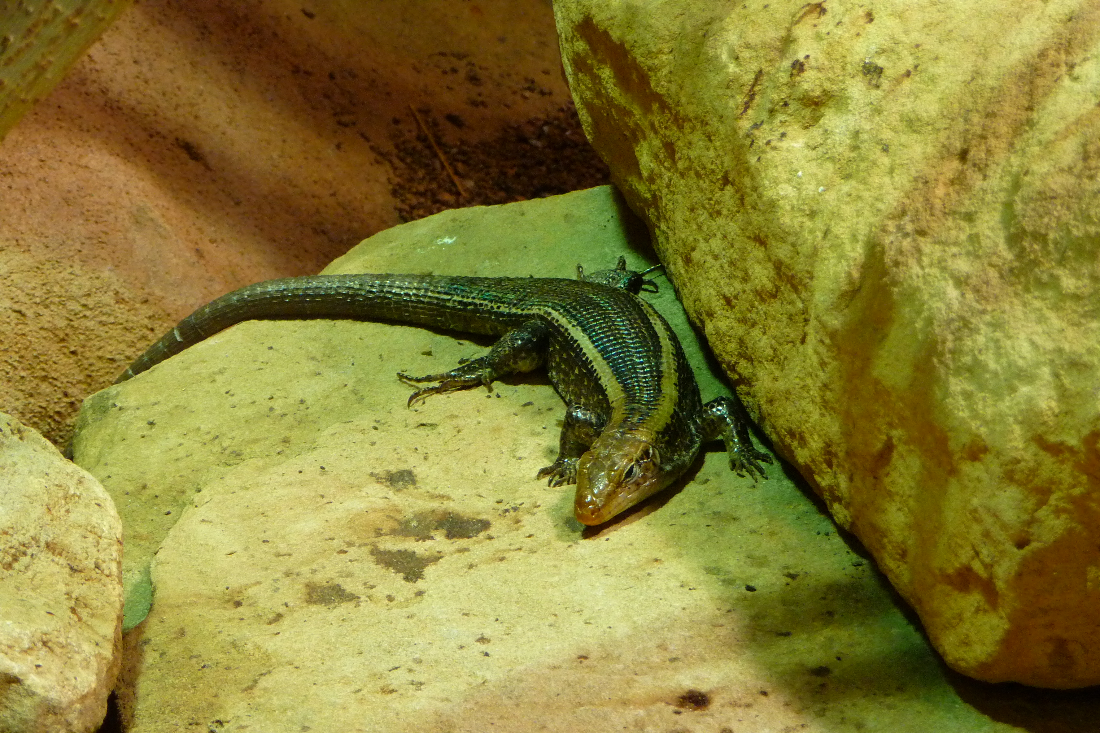 Reptilium Landau